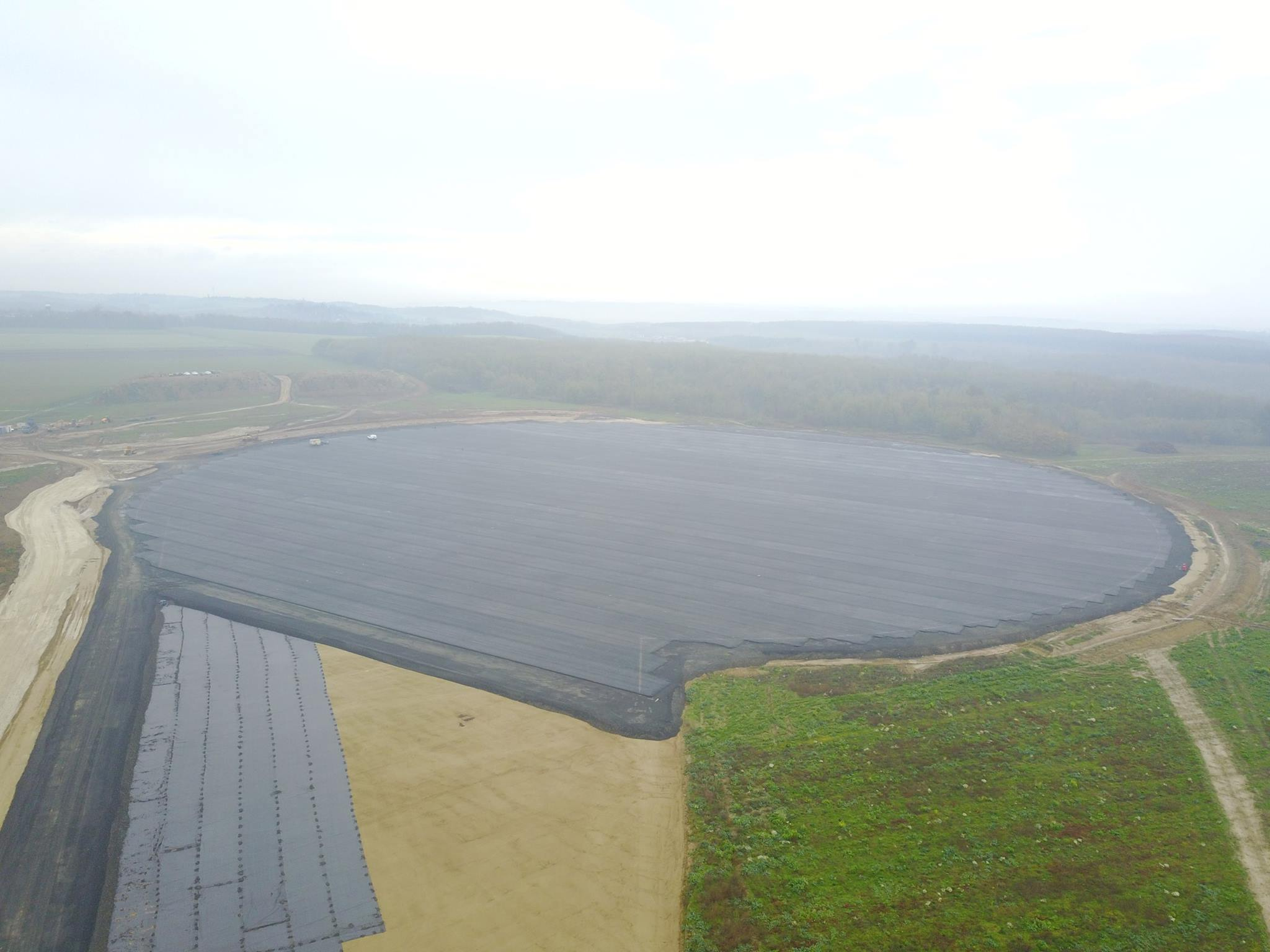 ZalaZone dinamikai felület